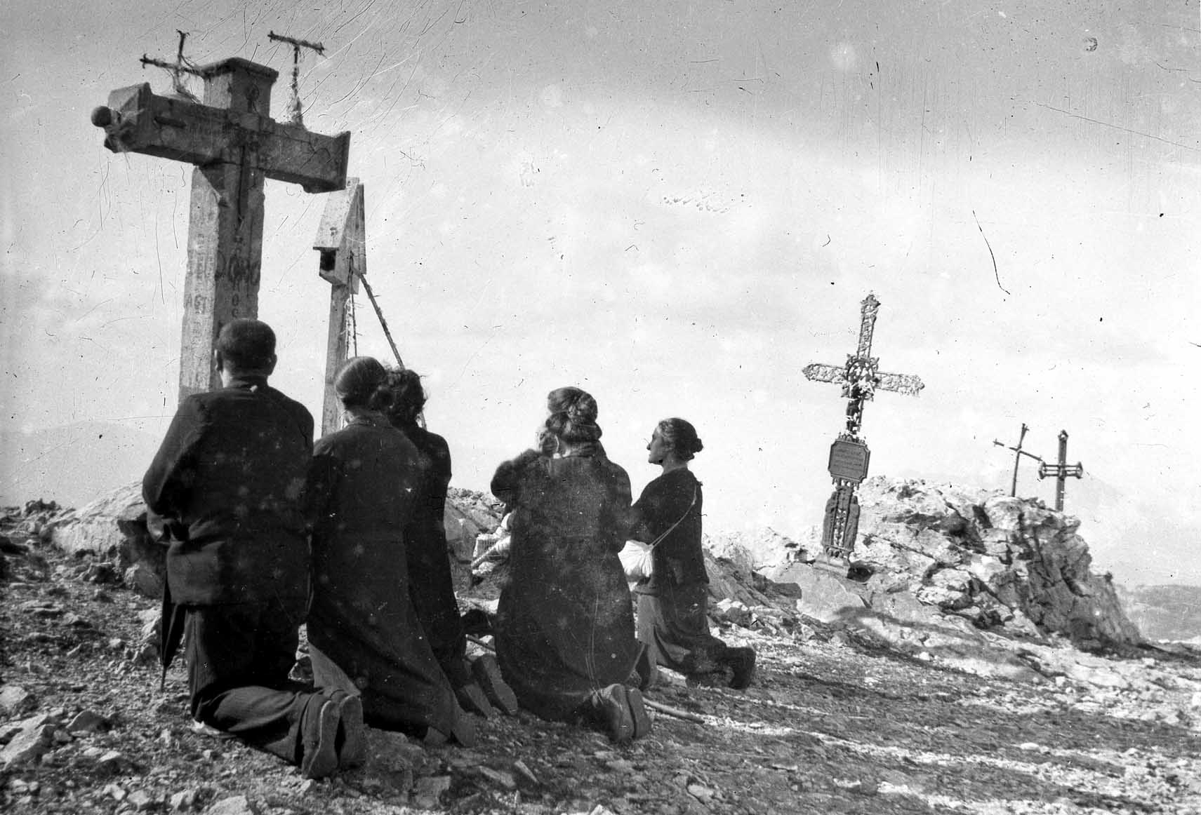 Ernioko gailurrean errezoan. Data ezezaguna zaigu.